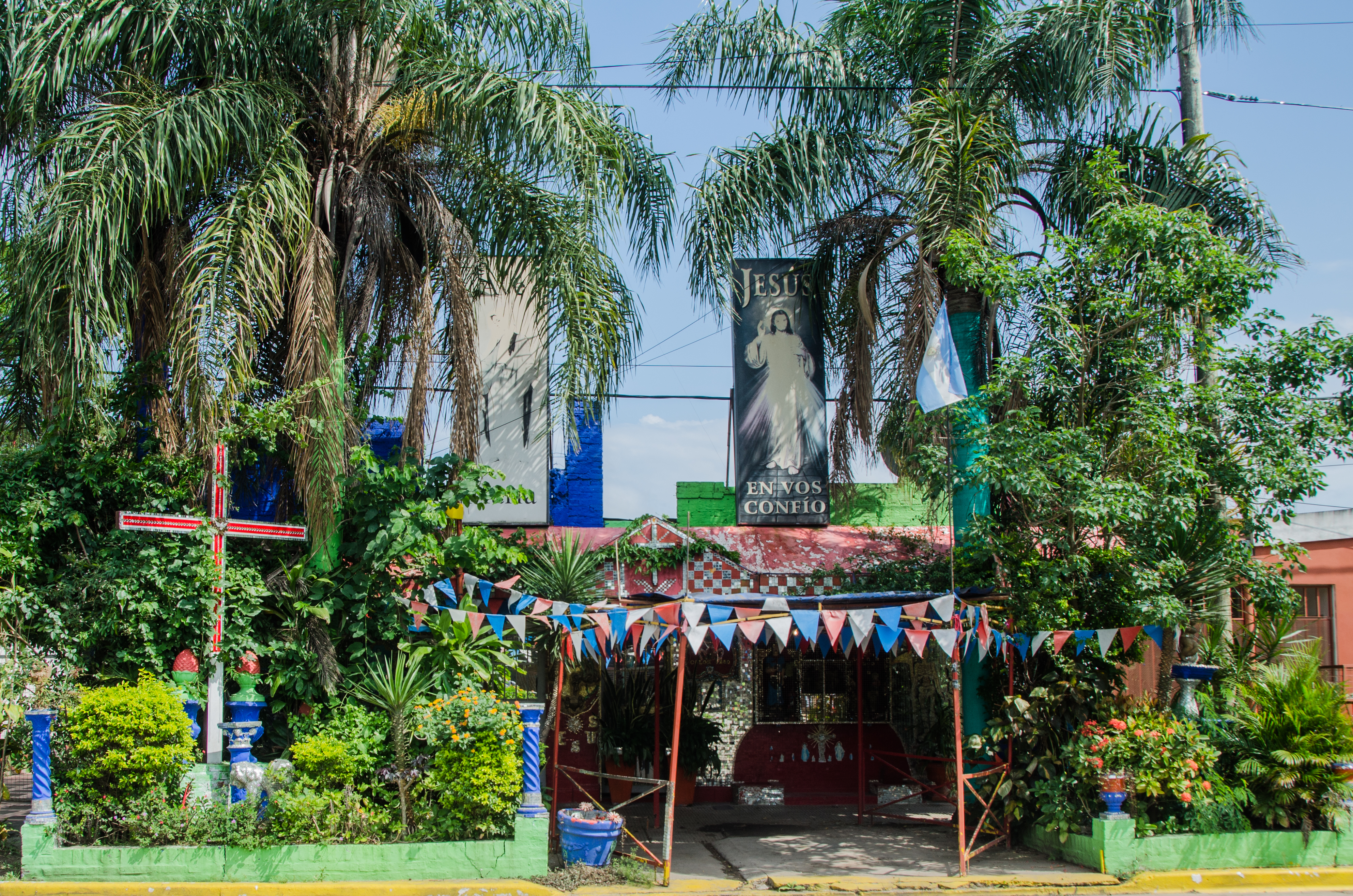 Santuario de San La Muerte en Colón 1260. Fte.: Lucas Tissera (2017)